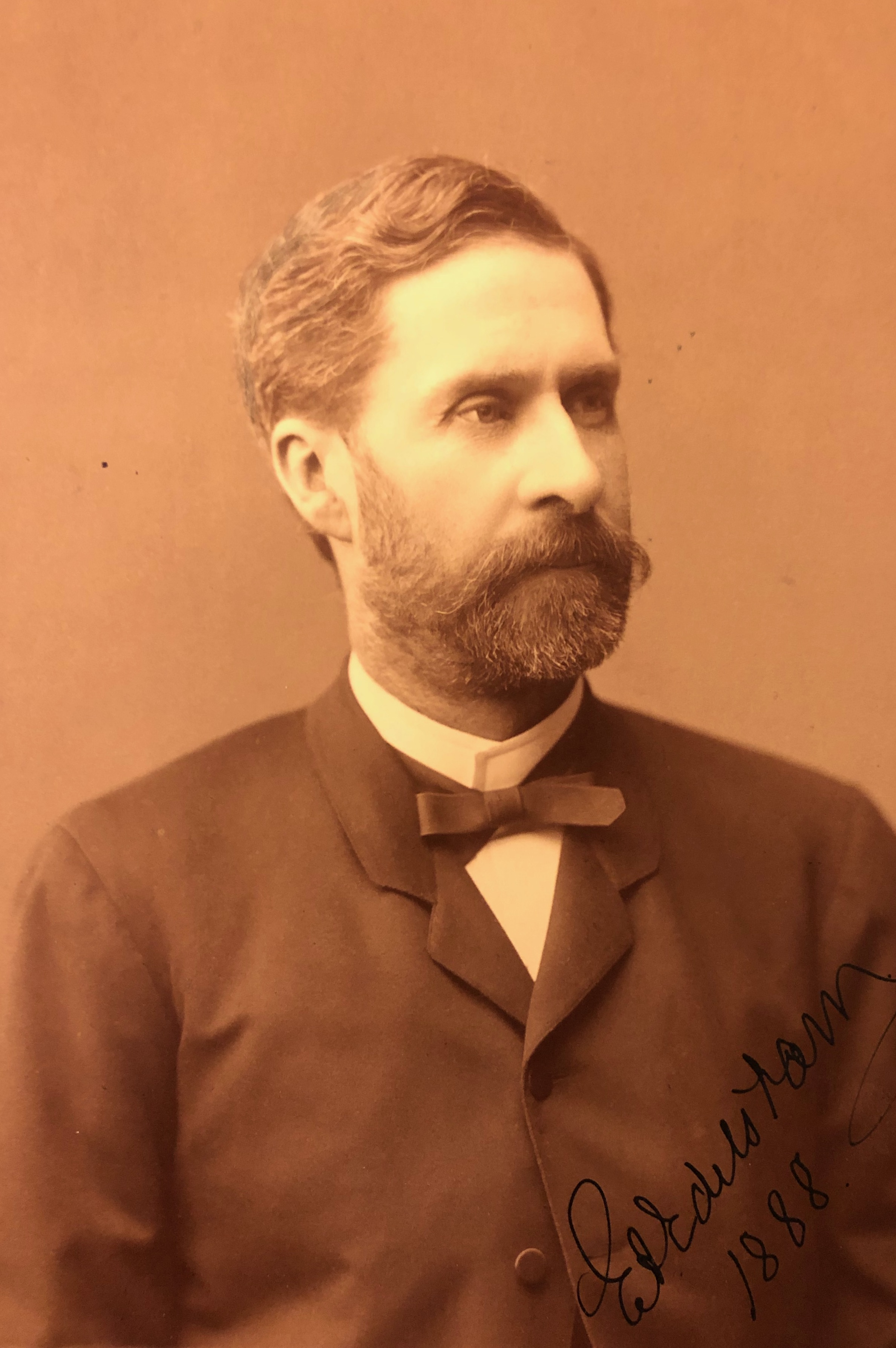 Ernst August Edelstam (1837-1900)